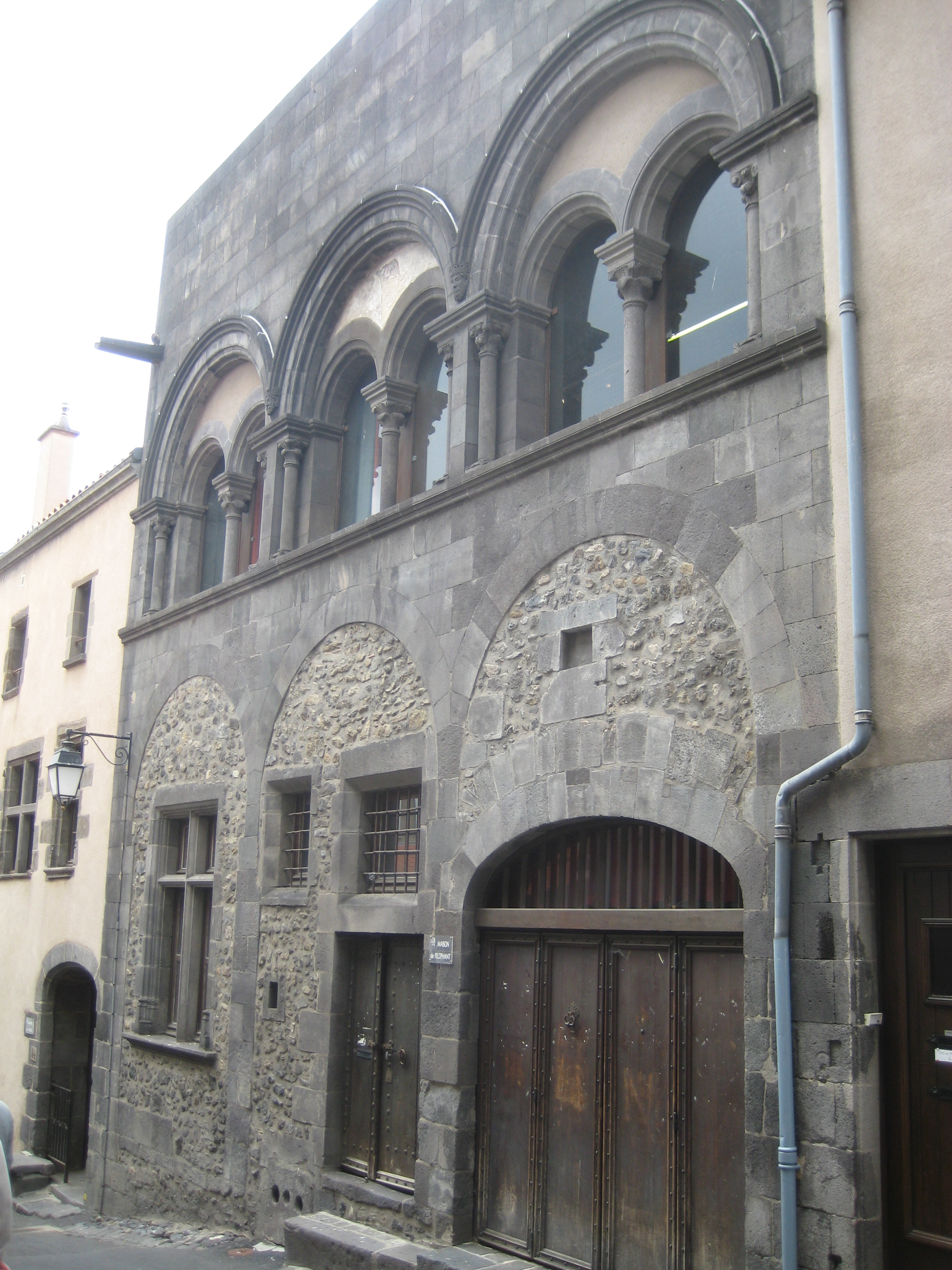 Maison de l'Éléphant, 12 rue Kléber .